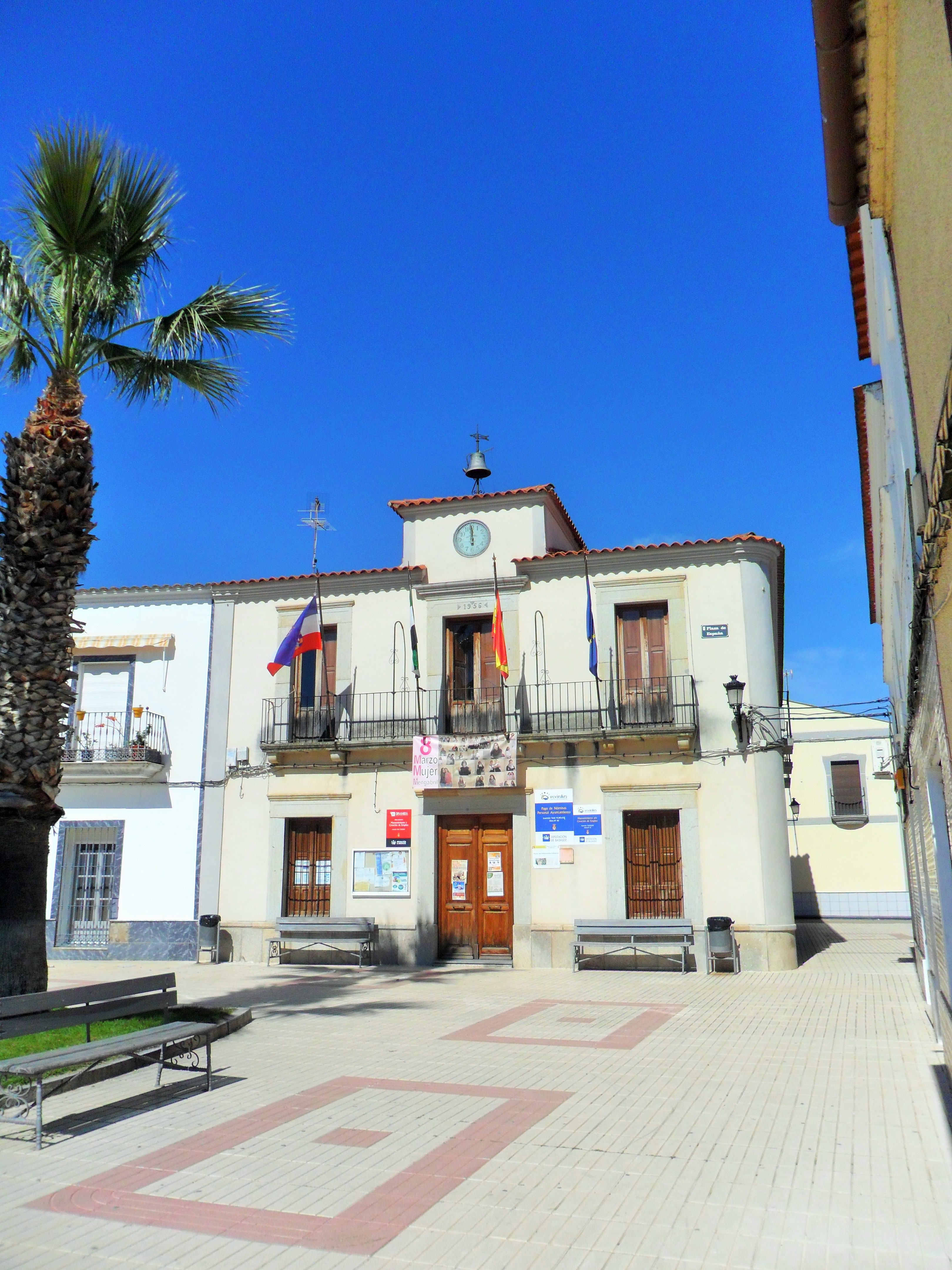 Ayuntamiento